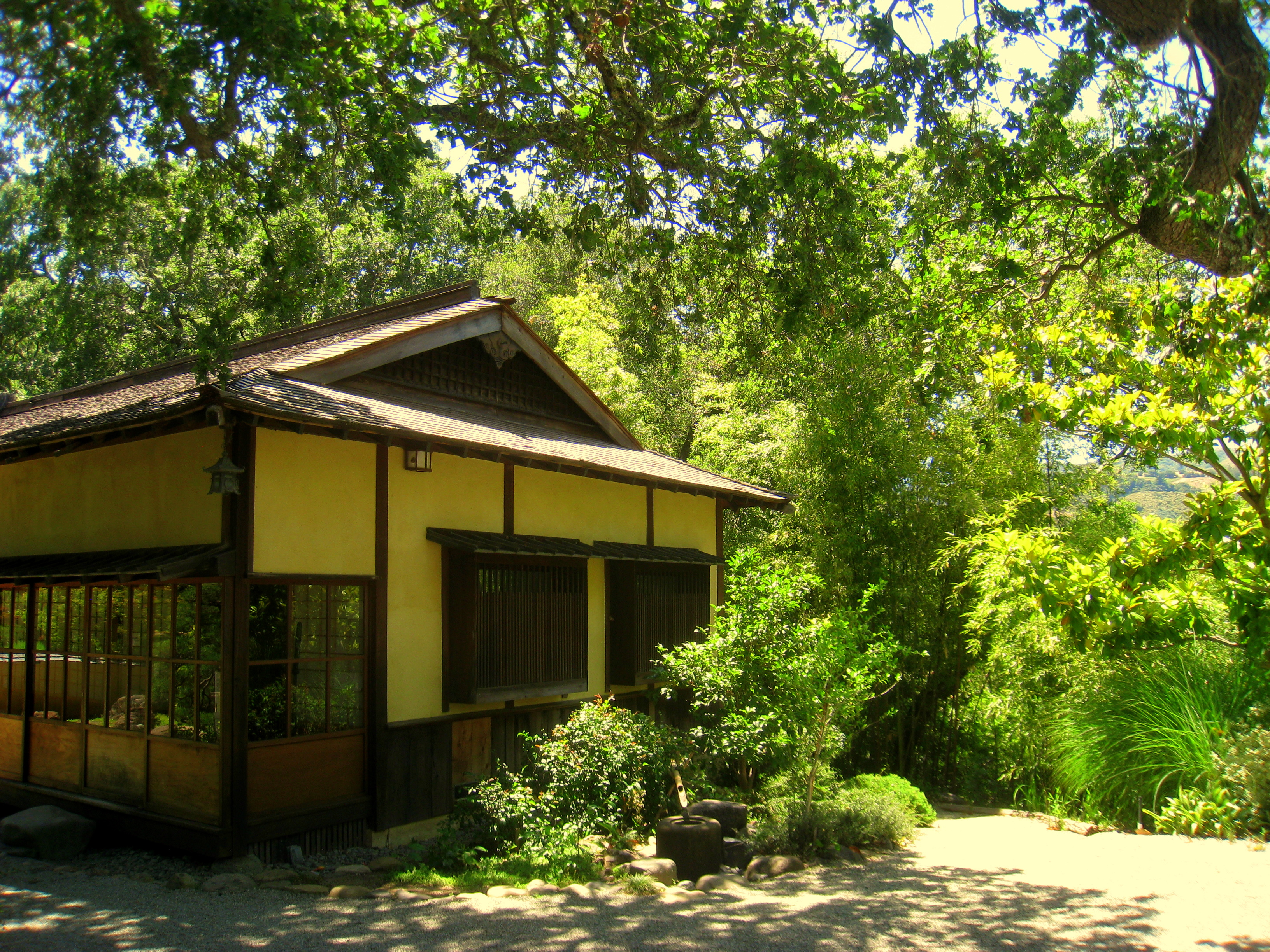 Hakone Gardens, Saratoga, California, USA.